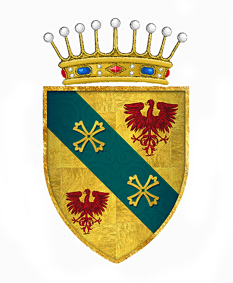 Brasão d´armas de conde de Almada e Abranches